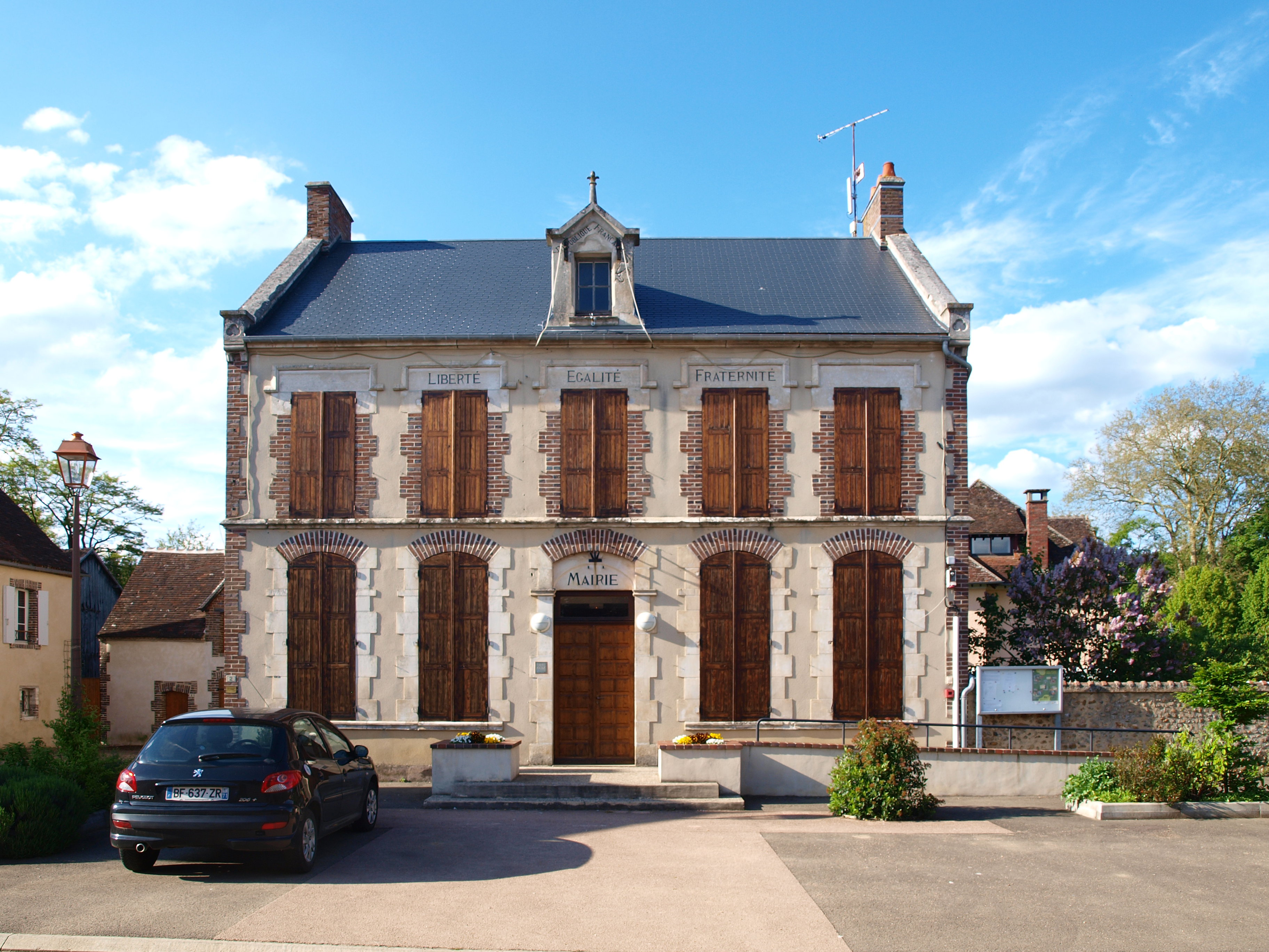 Dracy-sur-Ouanne (Yonne, France)